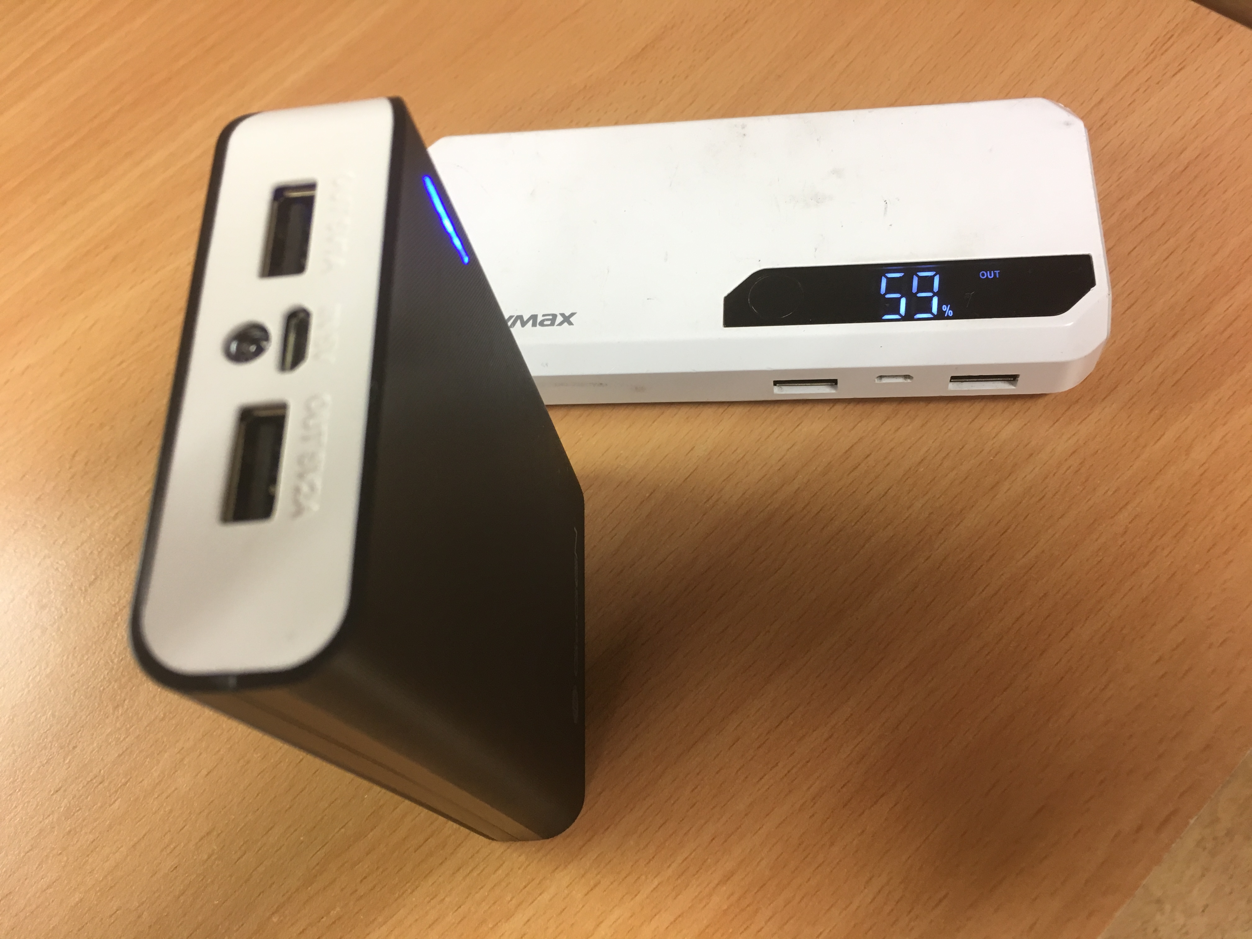 Powerbanky různých značek se dvěma výstupy a jedním vstupem. Obě mají funkci LED indikace stavu kapacity.